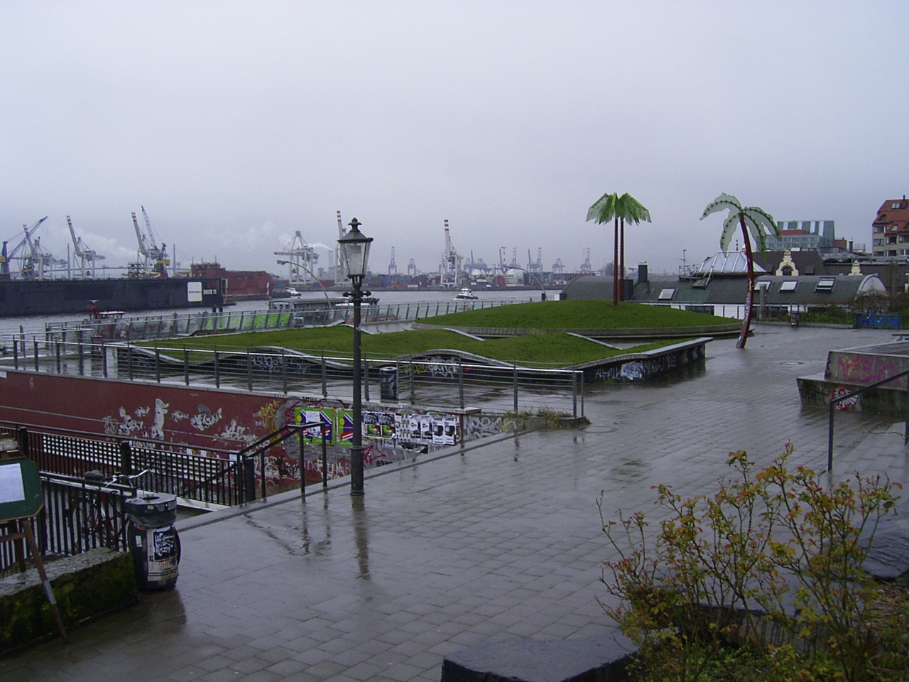 Park Fiction ist eine Installation im Antonipark in St. Pauli.